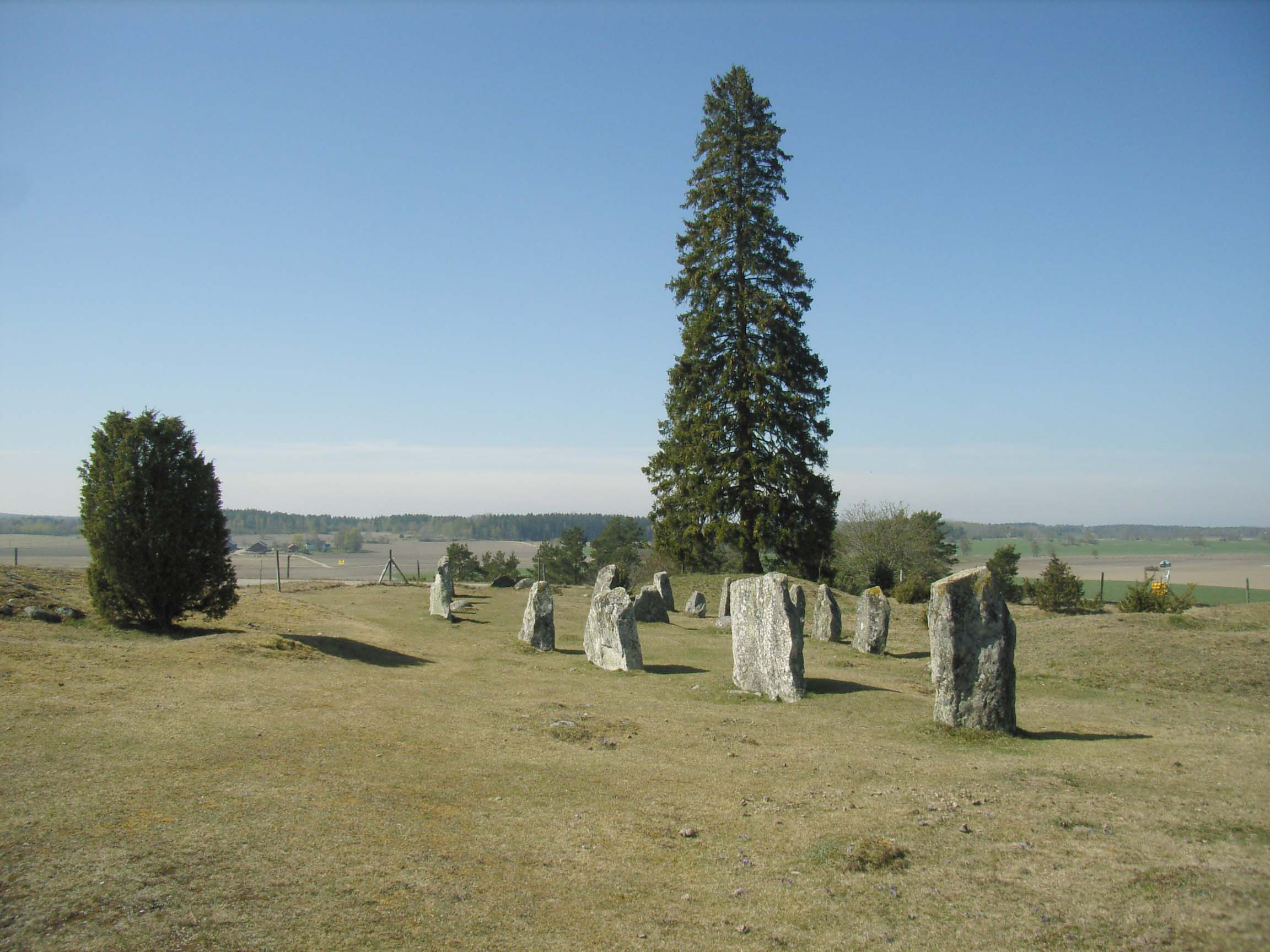 Backsippor Åsa gravfält, Selaön, Strängnäs kommun